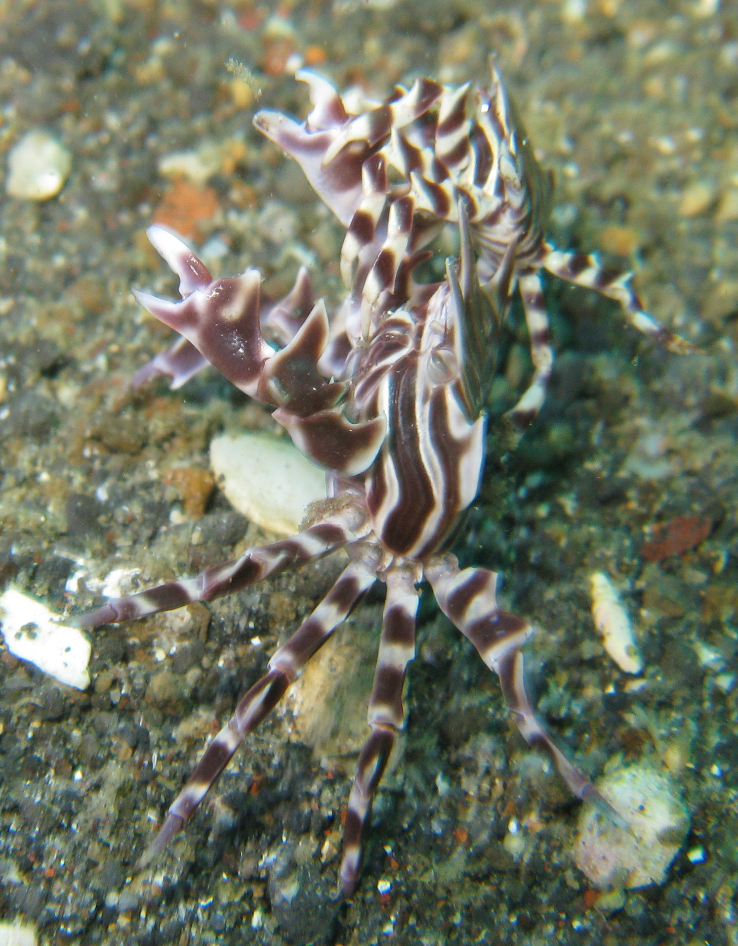 Crab